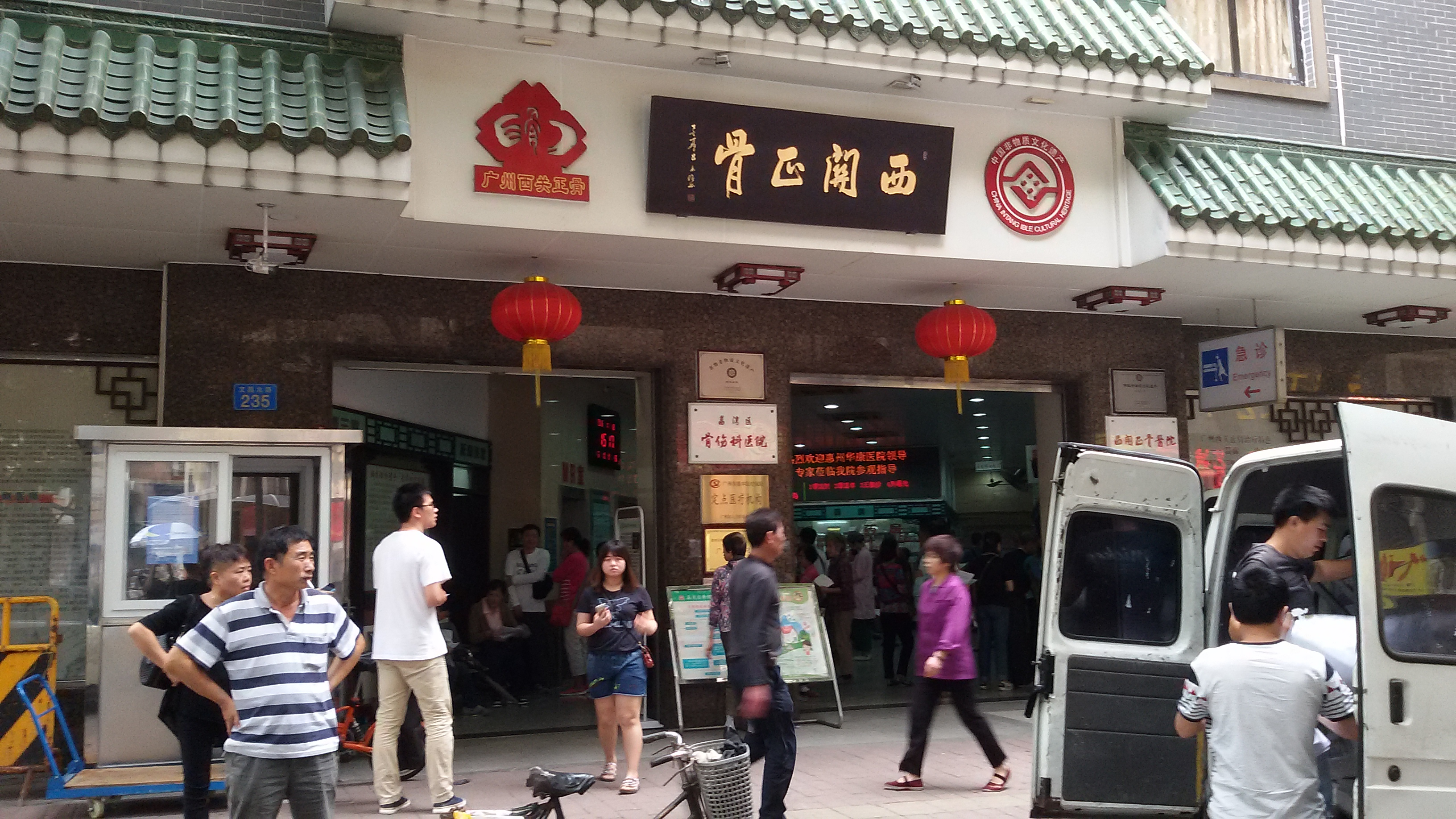 粵語: 荔灣區骨傷科醫院（西關正骨醫院）